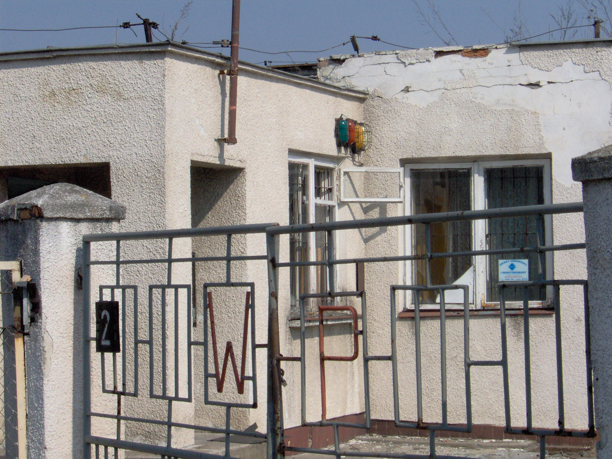 Pozostałości po bramie wjazdowej od ul. Wojskowej (2007 r.)